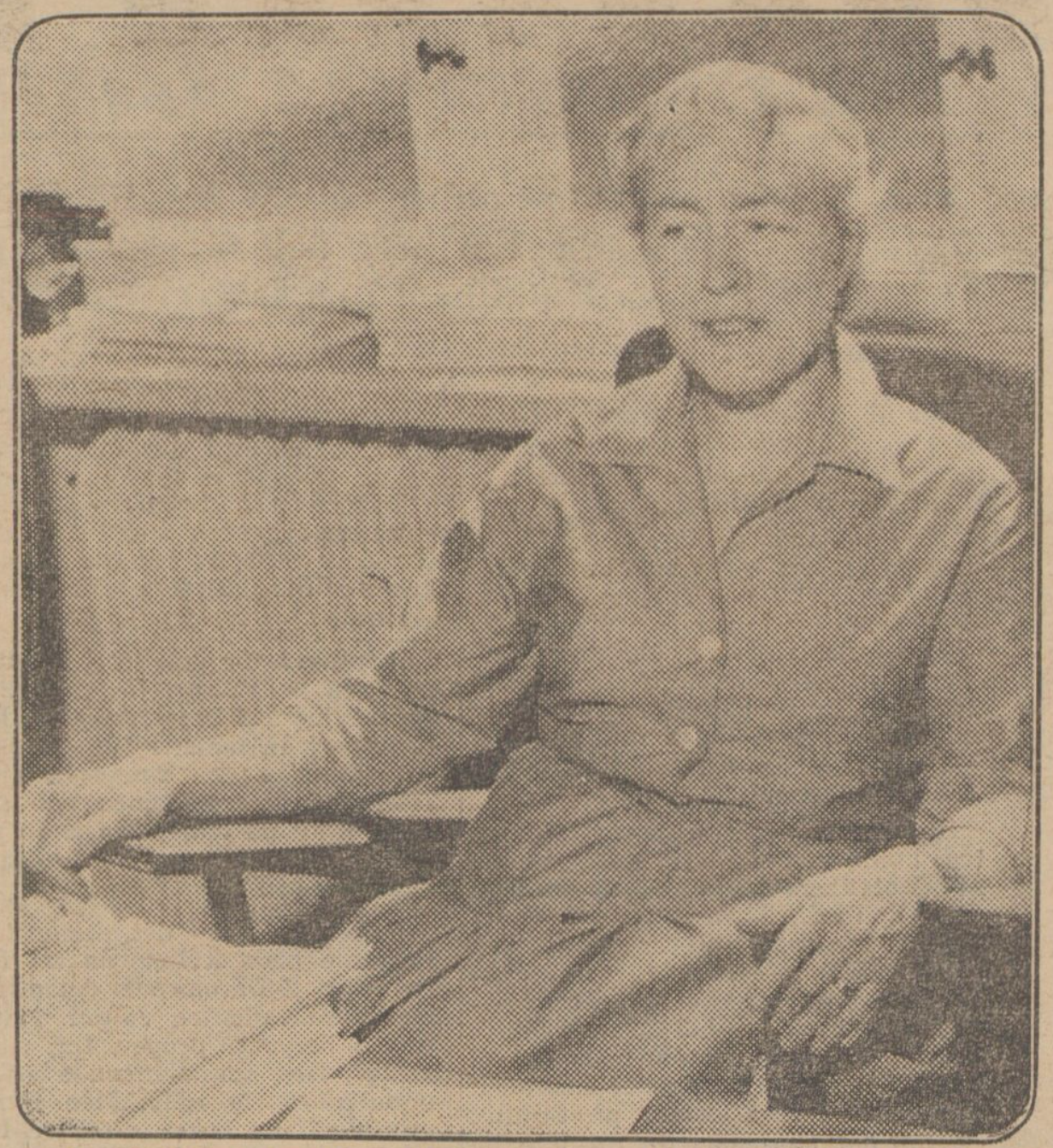 Nancy Eriksson porträtterad i Expressen 1964 vid utgivningen av Bara en hemmafru.